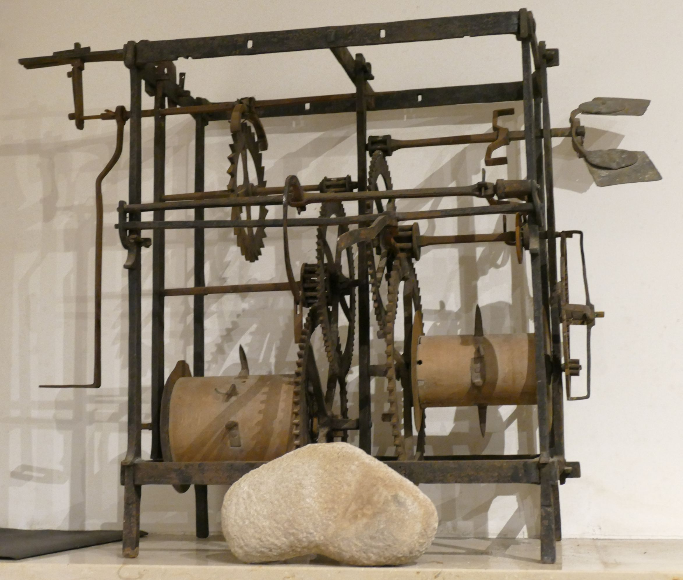 Uhrwerk aus der Kapelle Linsen